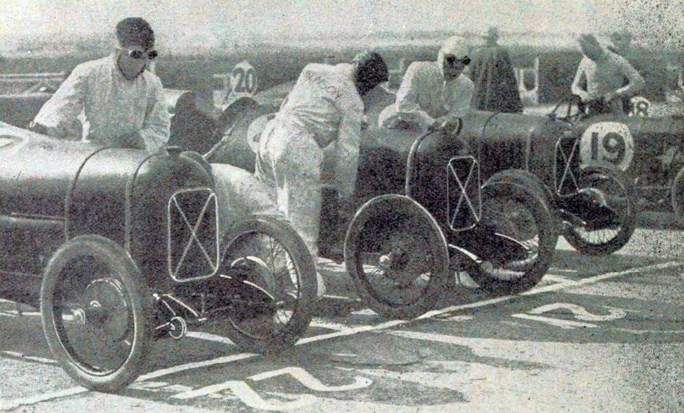 L'écurie Salmson, au départ des 'Junior Car Club 200 mile' du circuit de Brooklands, en septembre 1925 (victoire catégorie voiturettes 1.1L).